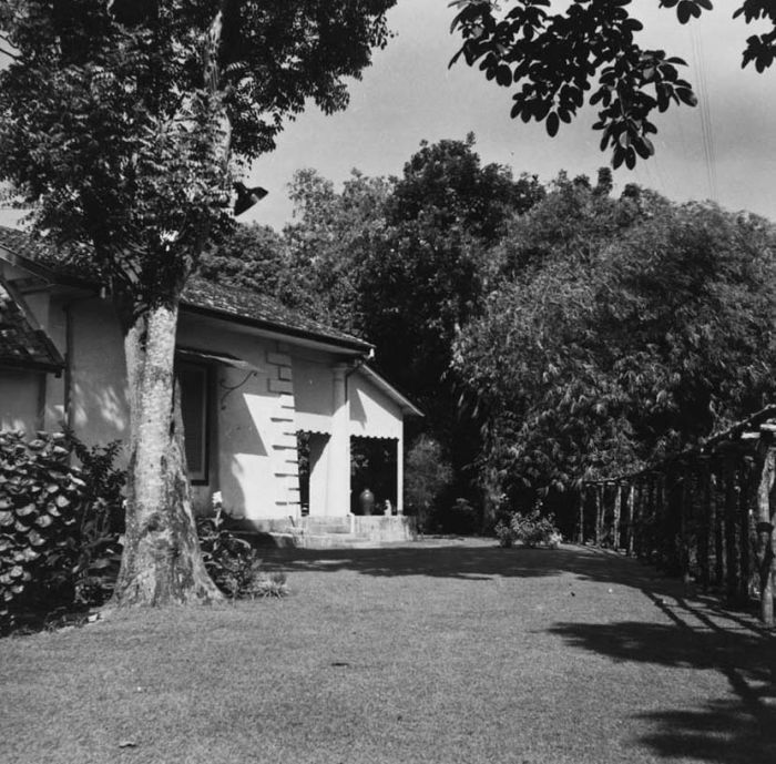 Foto. Tuin bij het huis van Paul Spies aan de Parapattan 42, Djakarta